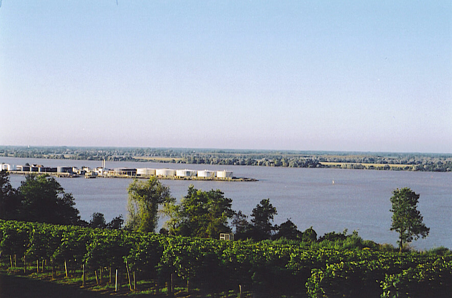 self made